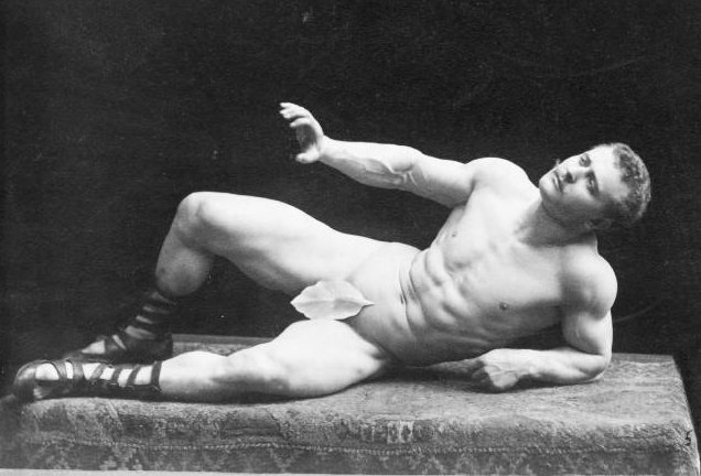 Versión recortada de Eugen Sandow